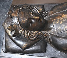 Eleonora Kastilská